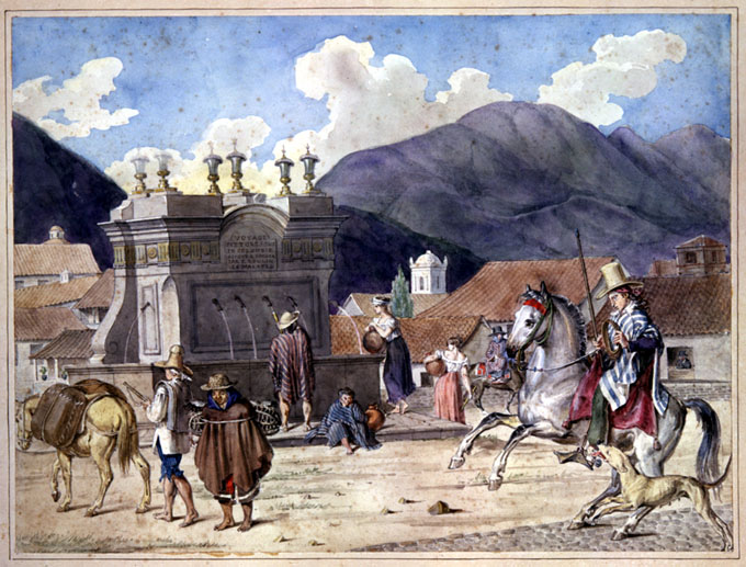 Plaza de San Victorino, en Bogotá, Colombia, hacia 1824 (Acuarela)